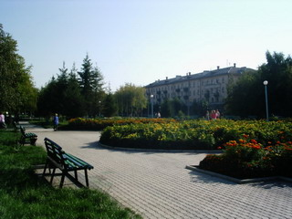 Площадь им. Здобного, ул. Комсомольская, г. Шадринск, Курганская обл., Россия (Avenue of the Victory, street. Komsomol, Shadrinsk, Kurgan region, Russia) Автор/Autor - Сычугов М.В./ Sychugov M.V. Время создания/Data-Time - 19 июня/june, 2004, 17:10 Фотоаппарат/Camera - Mustek DC 4000